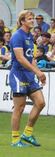 Aurélien Rougerie entraînement